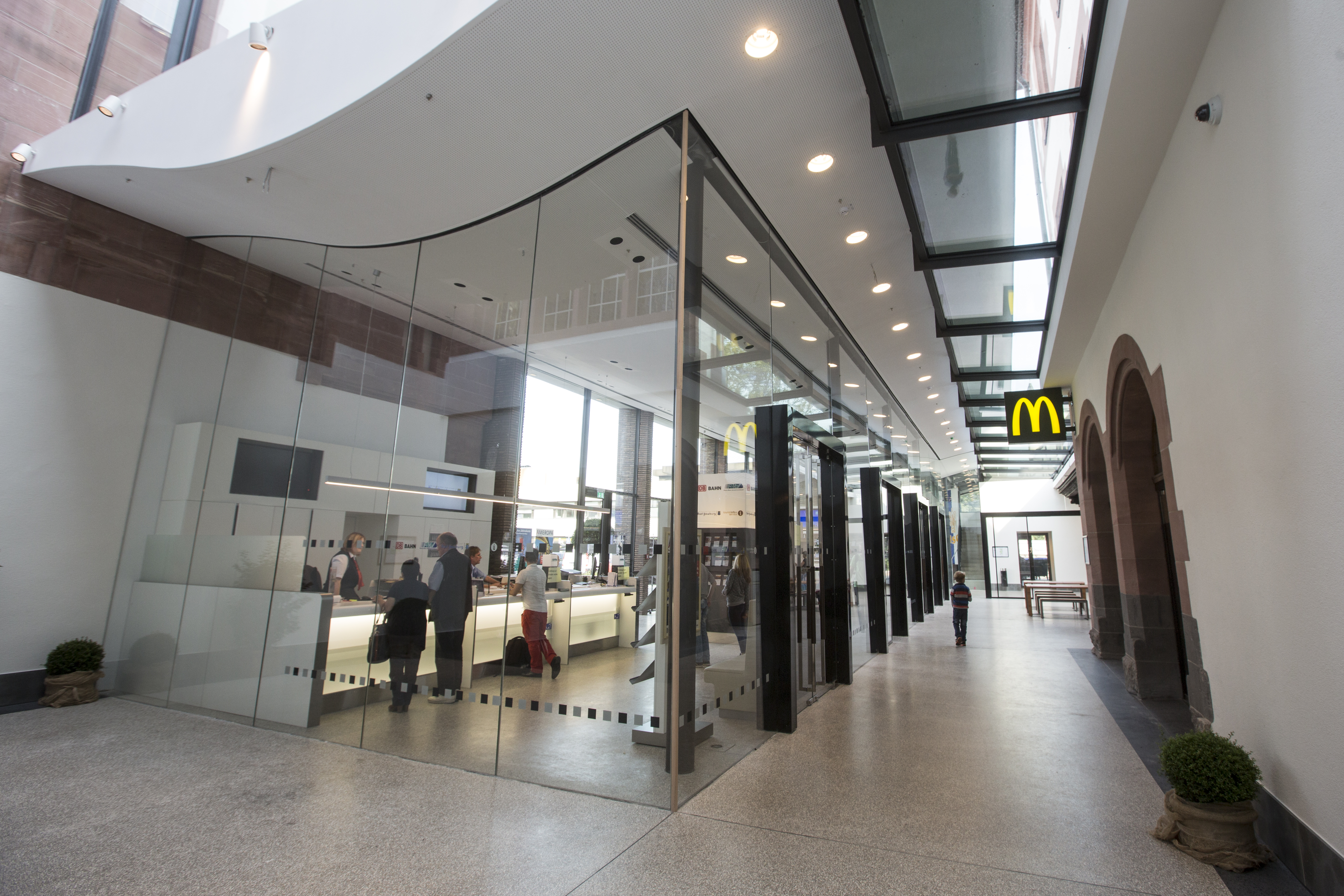 Blick aus der Haupthalle auf Reisezentrum und Tourist Information (links) und McDonald's-Restaurant (rechts) im Bad Homburger Bahnhof.